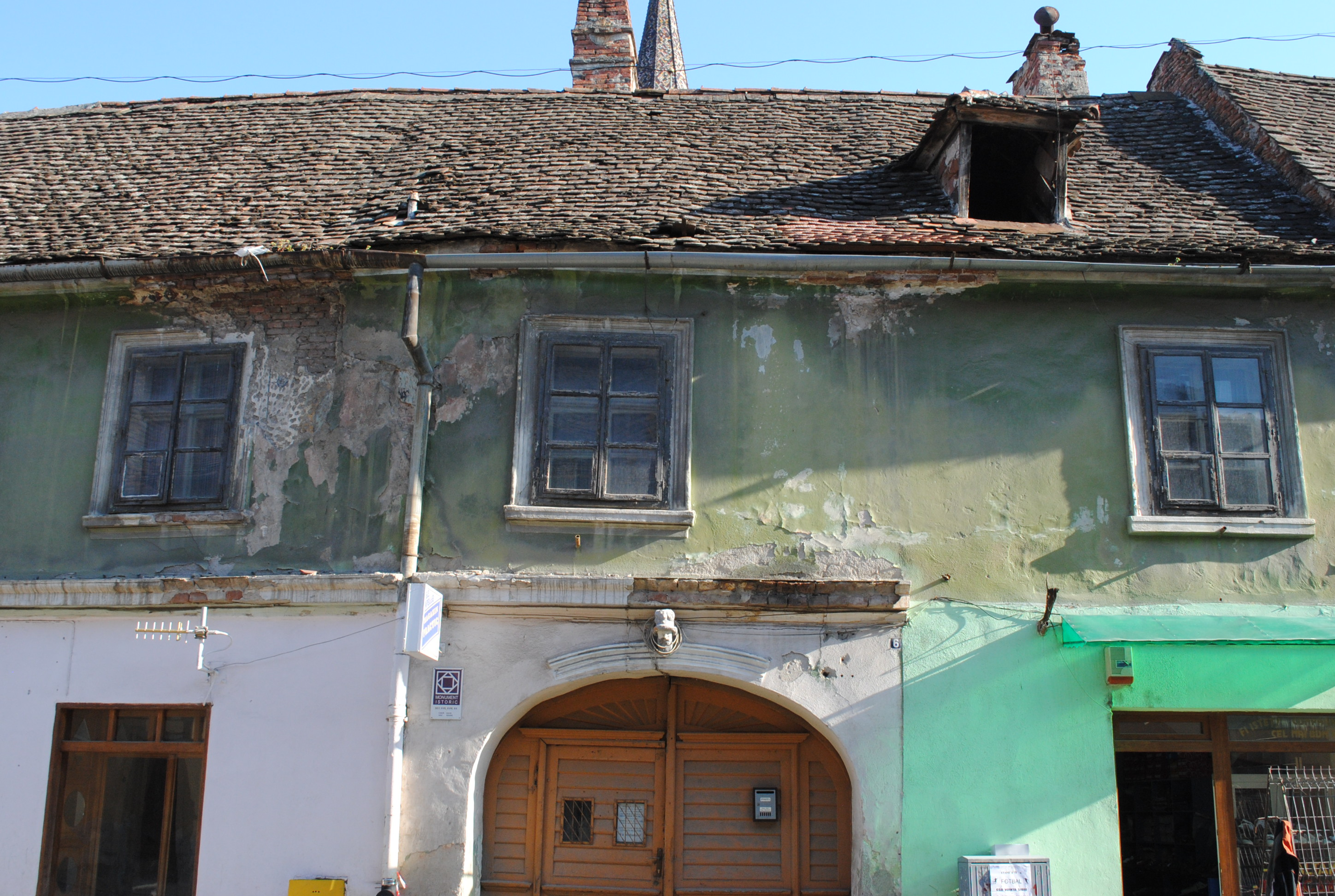 Casă, sec. XVII, sec. XVIII; prima jum. a sec. XX